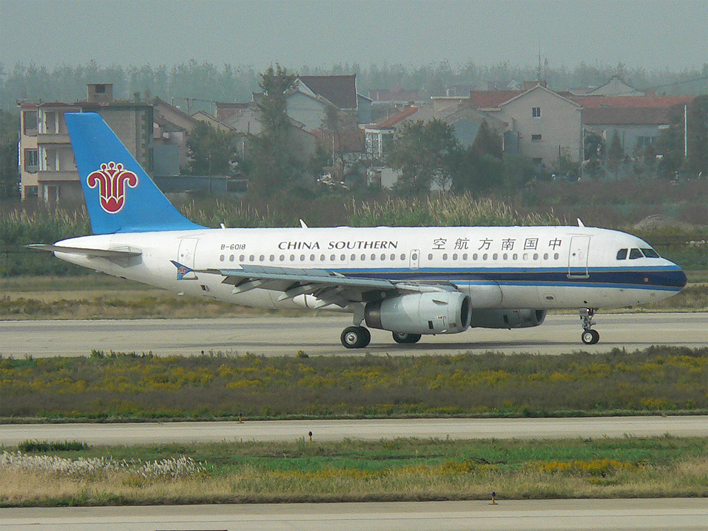 Airbus A319 der China Southern Airlines auf dem Flughafen Pudong in Shanghai